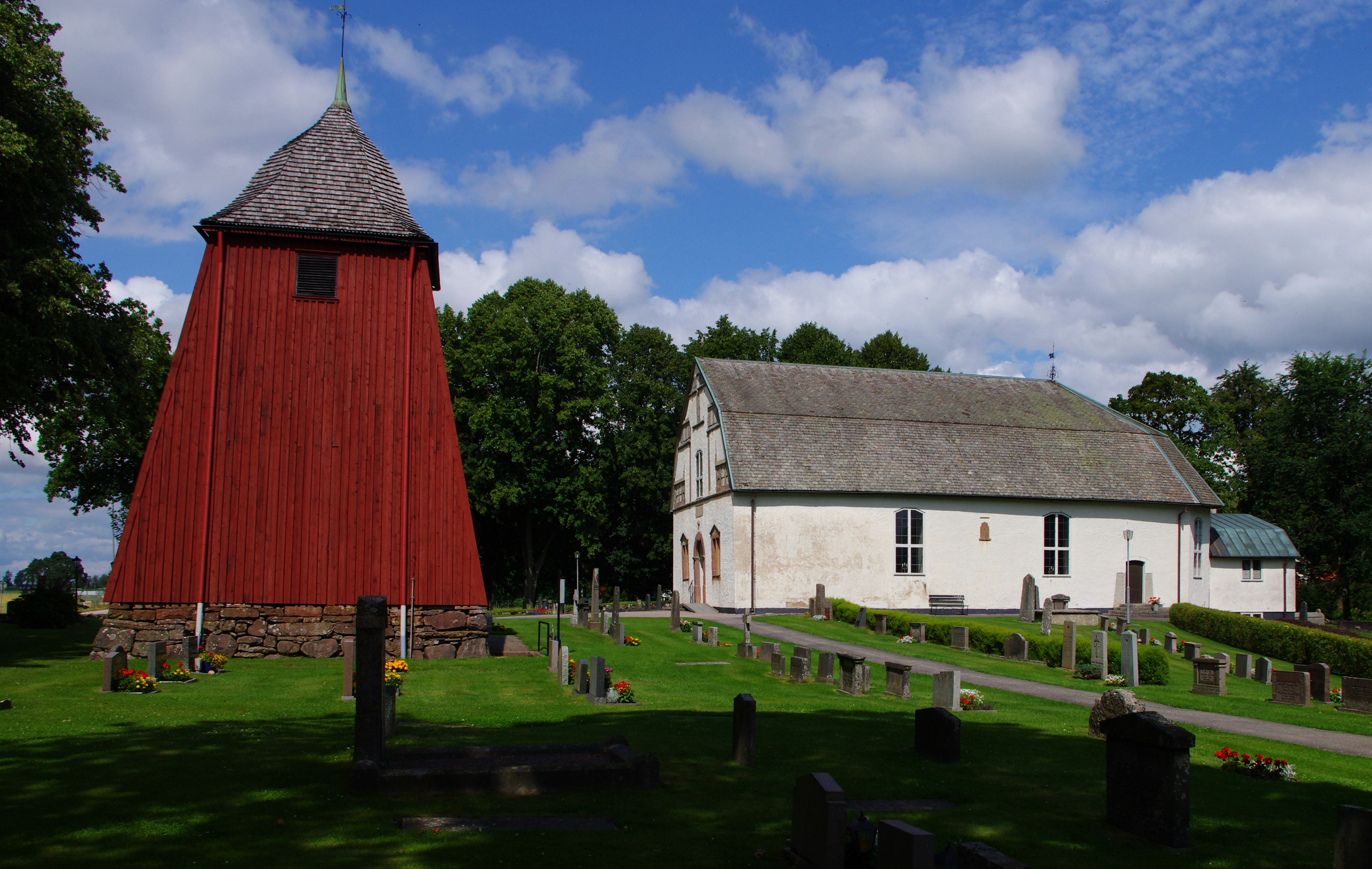 Norra Härene kyrka i Lidköpings kommun (i Norra Härene socken) i Västergötland i Sverige.